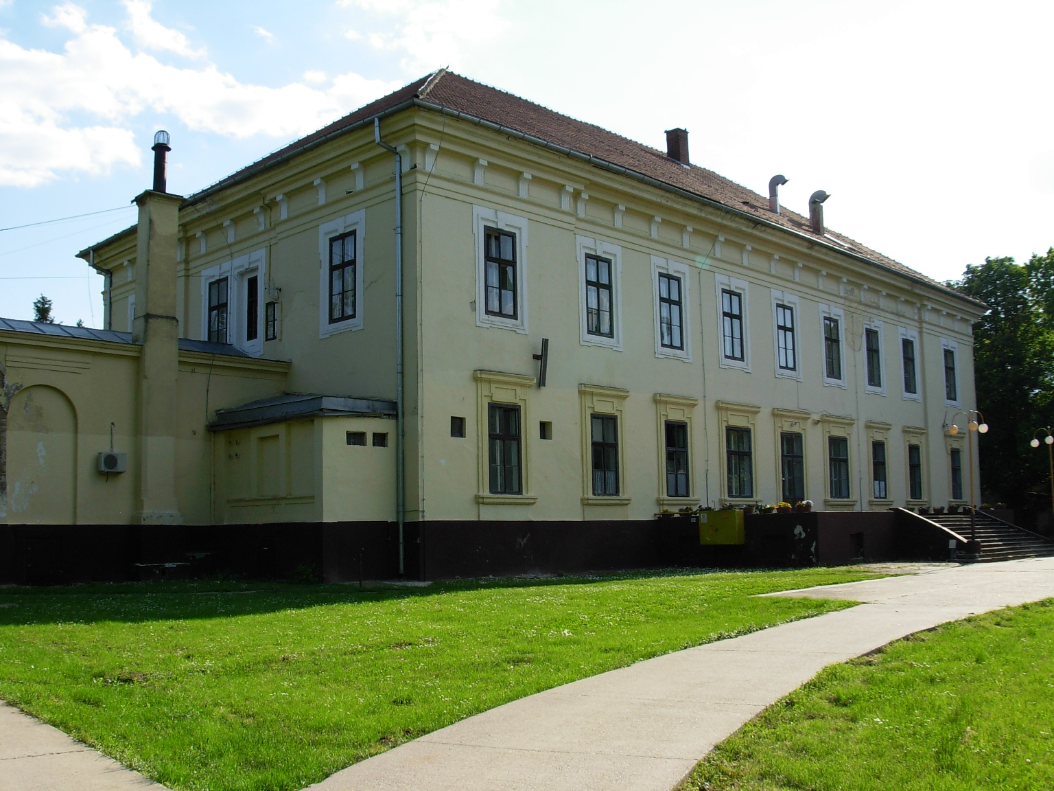 Zadnja strana srednje poljoprivredne škole u Futogu.